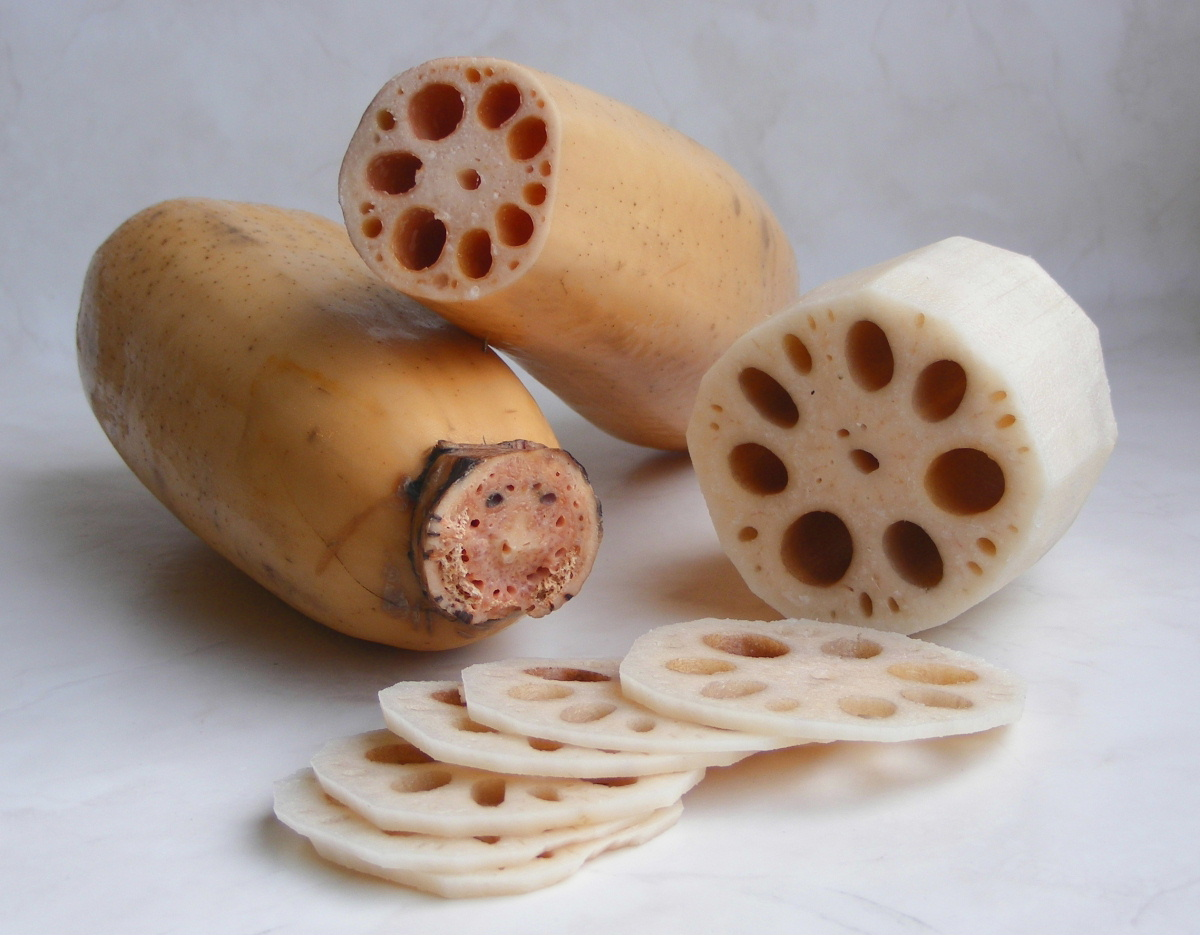 Lotus rhizome (Nelumbo nucifera)